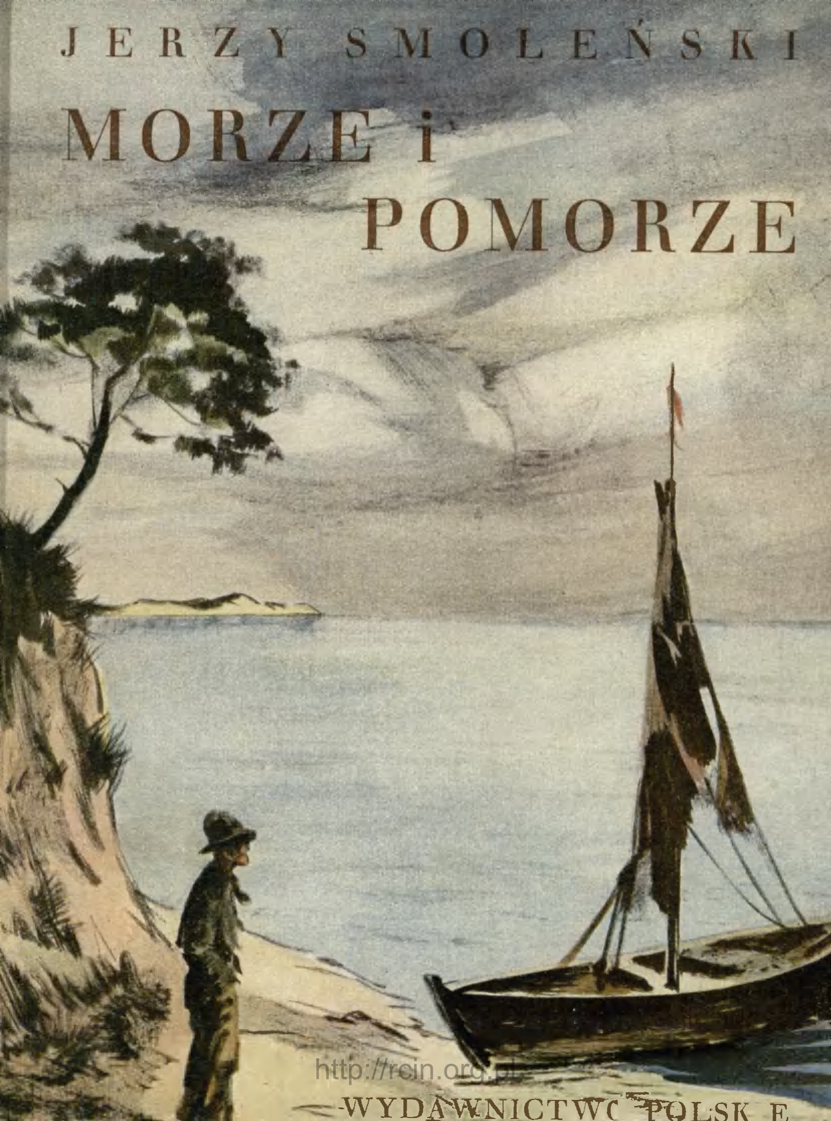 Jerzy Smoleński. "Morze i Pomorze" (seria "Cuda Polski") 1928. Okładka autorstwa Kamila Mackiewicza (1886-1931)